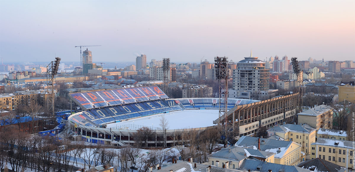 Центральный стадион профсоюзов (Воронеж) днем